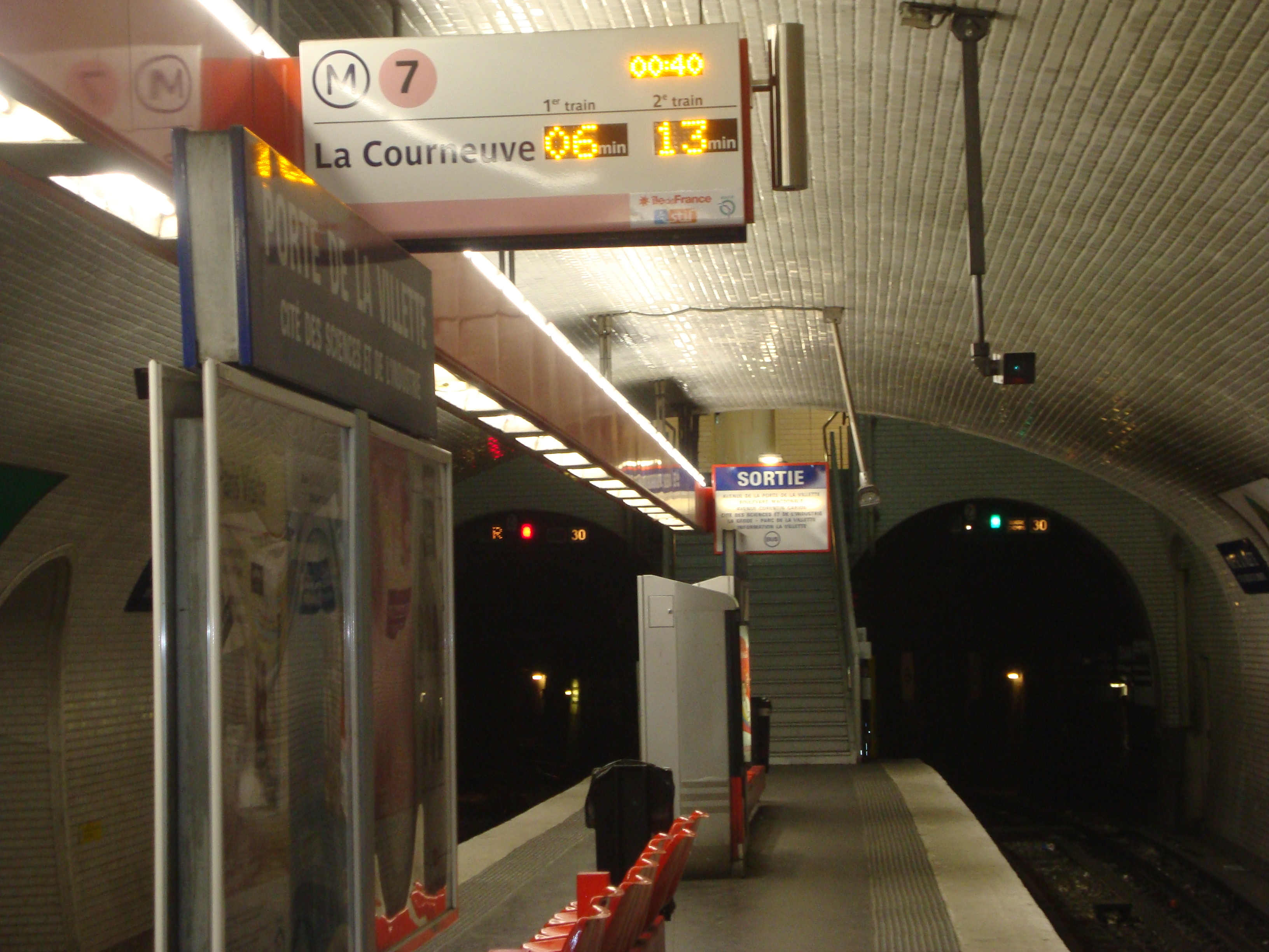 Le quai central est de la station de métro Porte de La Villette sur la ligne 7. Escalier sud.